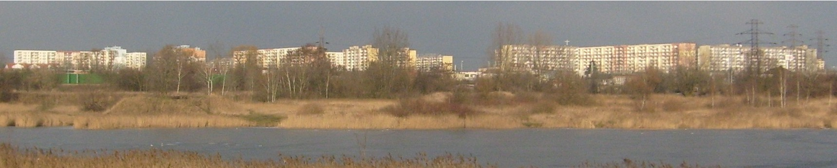 Panorama os. M. Kopernika w Poznaniu